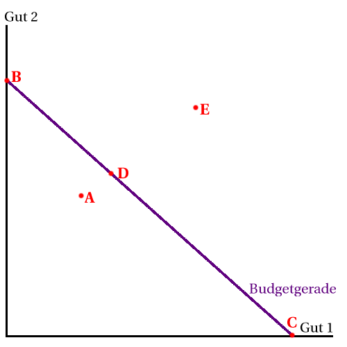 Budgetgerade